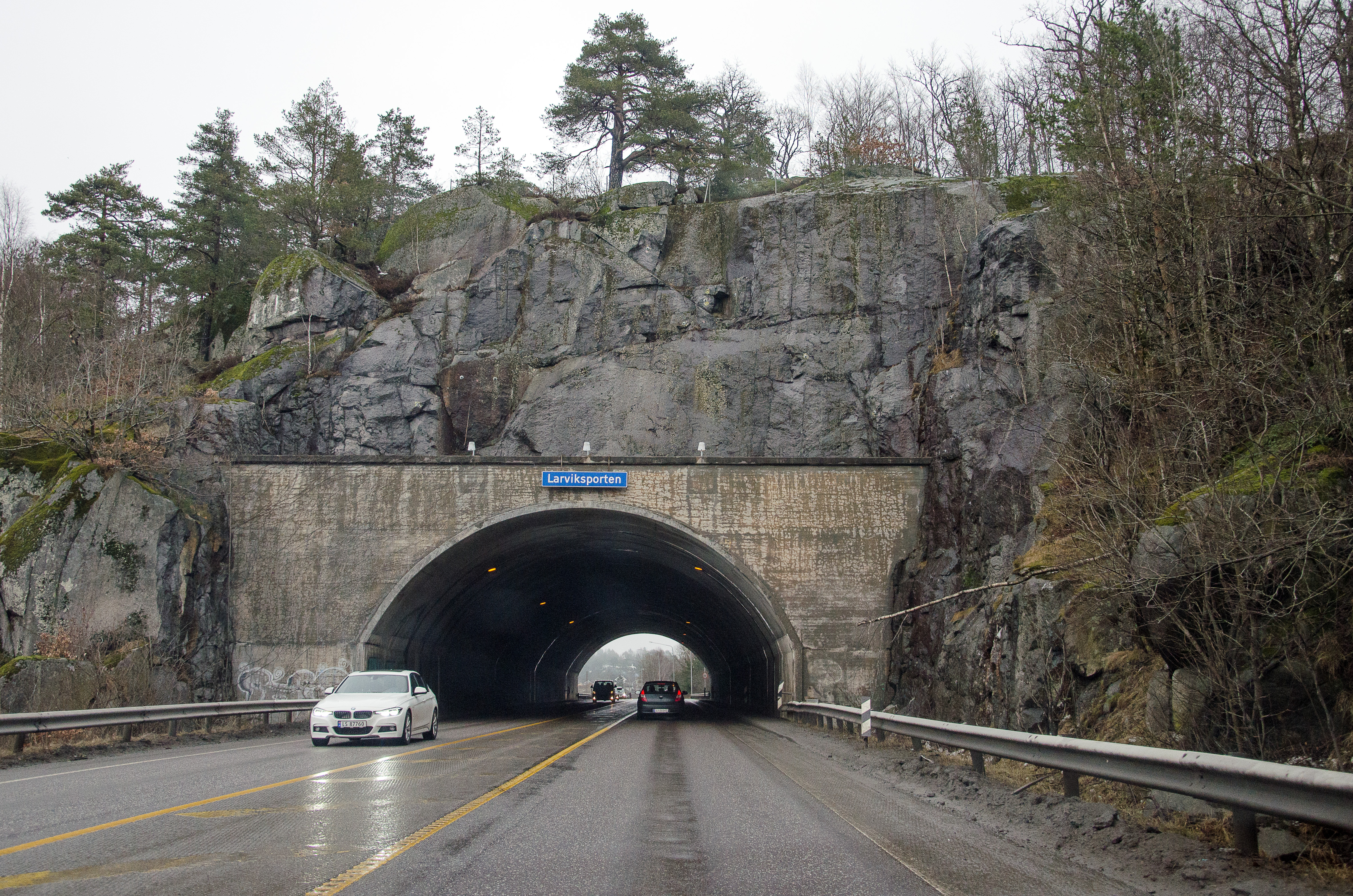 Larviksporten, tunnel på europavei 18 i Larvik